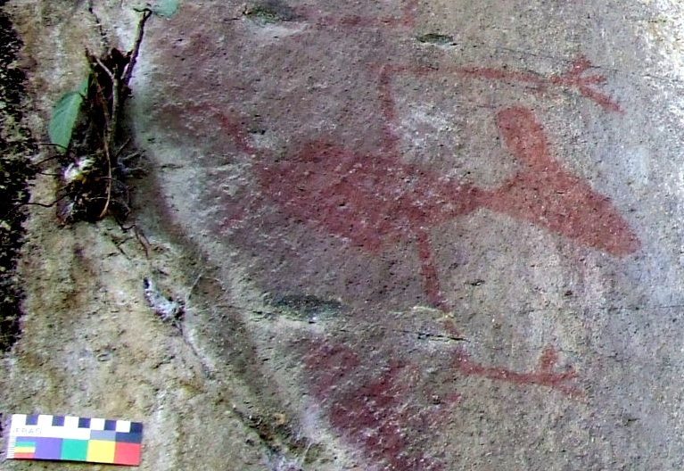 Fotografía de un zoomorfo (ratón)